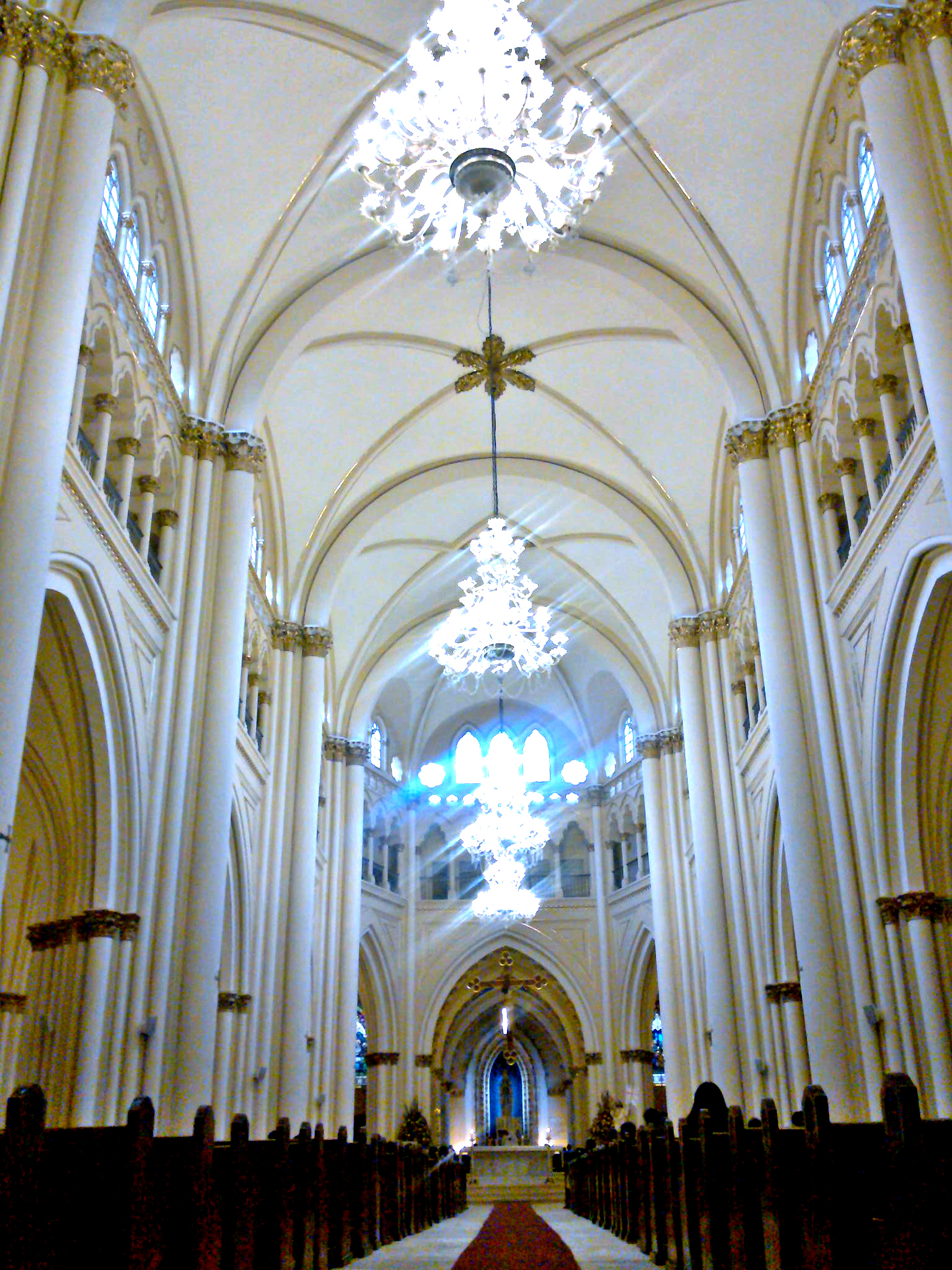 Nave central